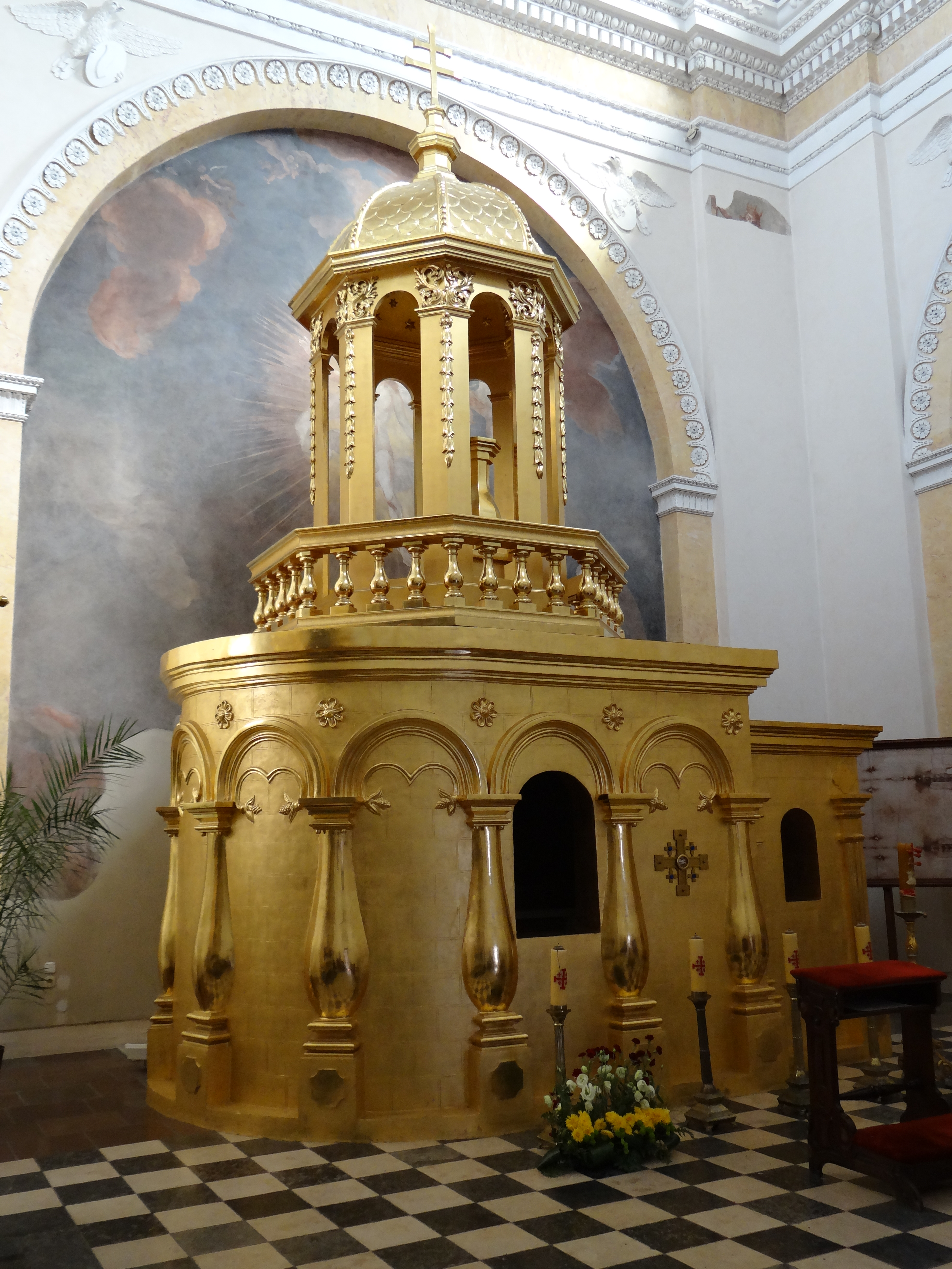 Przeworsk, kościół, ob. par. p.w. Św. Ducha (z kaplicą Grobu Chrystusa), 1430-1473, 1718, 1908